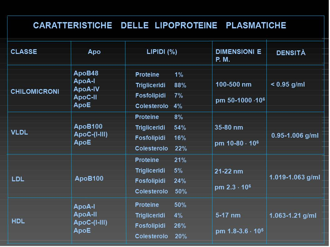 Composizione e caratteristiche delle lipoproteine. Dati da: P.O. Kwiterovich Jr. The Johns Hopkins textbook of dyslipidemia. Lippincott Williams & Wilkins. Philadelphia. 2010. C.M. Ballantyne. Clinical lipidology. Saunders-Elsevier. Philadelphia. 2009. H.M. Kronenberg et al. Williams textbook of endocrinology. 11 ed. Saunders. Philadelphia. 2008.